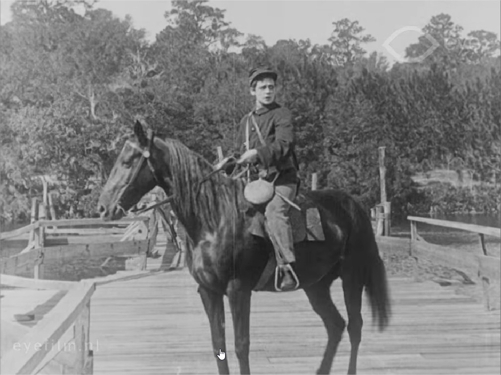 Gene Gauntier dans The Girl Spy Before Vicksburg (1910), film Américain produit par Kalem et réalisé par Sidney Olcott.